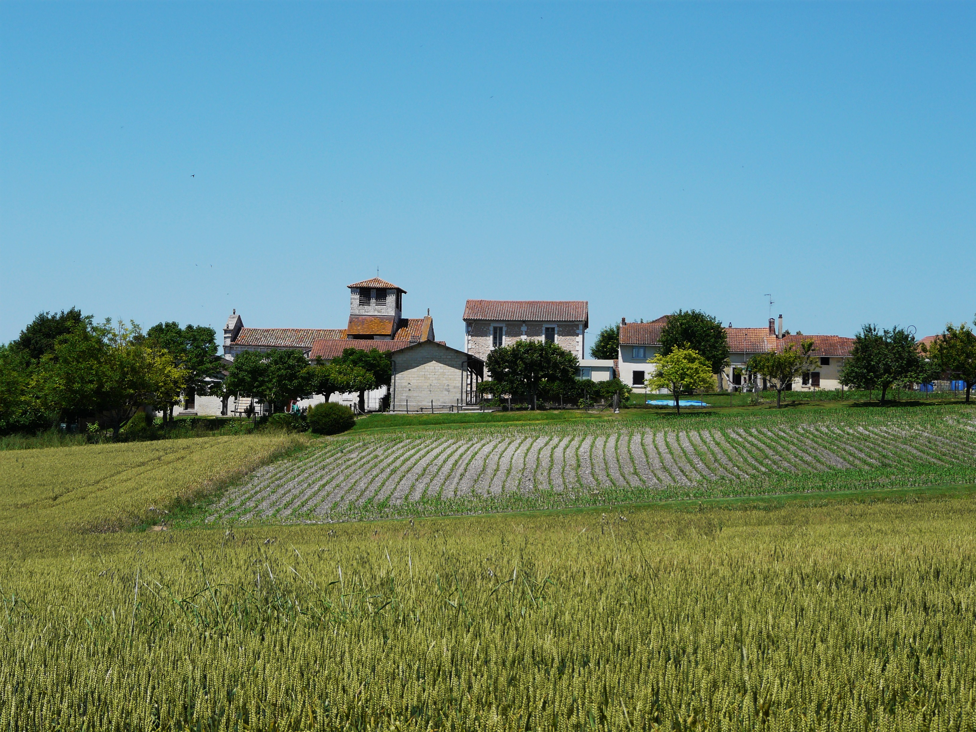 Vue générale de Cornille